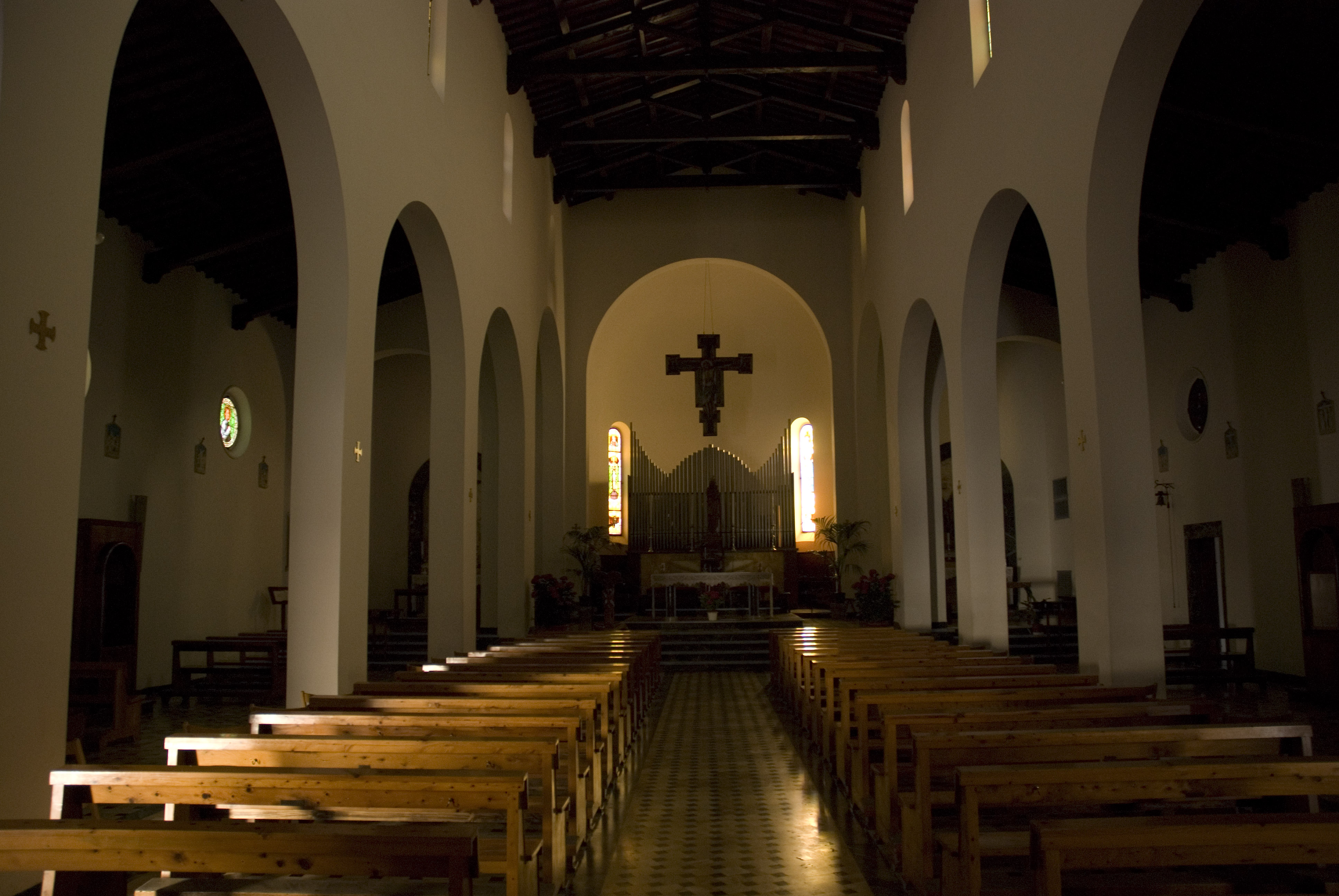 see description